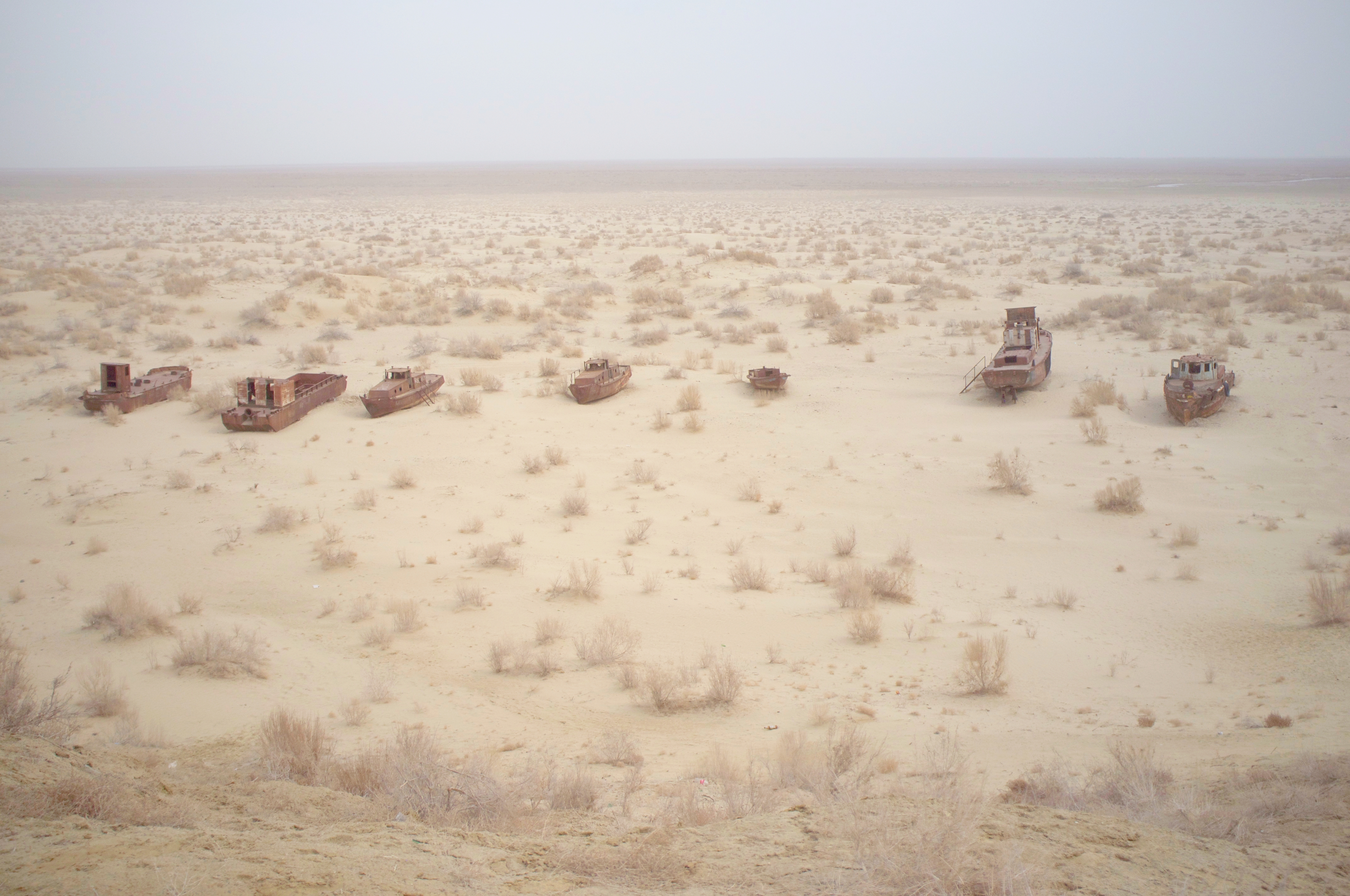 Muynak